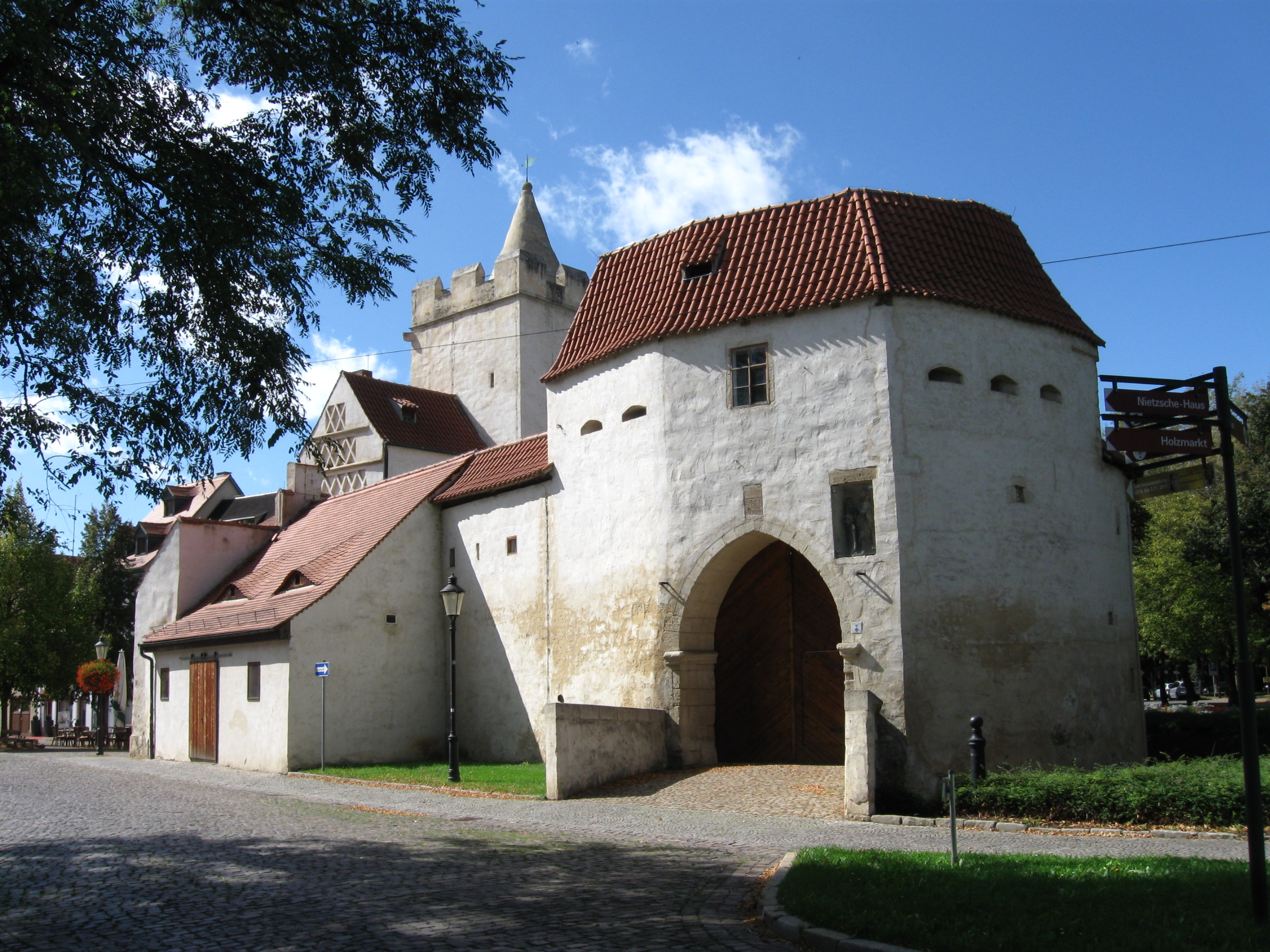 Marientor in Naumburg(Saale) von der Landseite gesehen